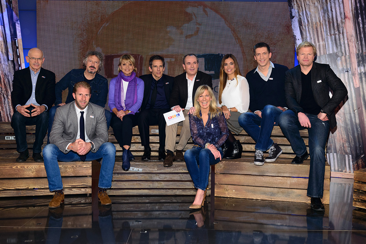 RTL-Spendenmarathon 2014. Von links nach rechts: Günter Wallraff, Wolfgang Niedecken, Uschi Glas, Ben Stiller, Wolfram Kons, Jana Ina Zarrella, Steffen Hallaschka, Oliver Kahn. Vorne: Christopher Posch und Ulrike von der Groeben